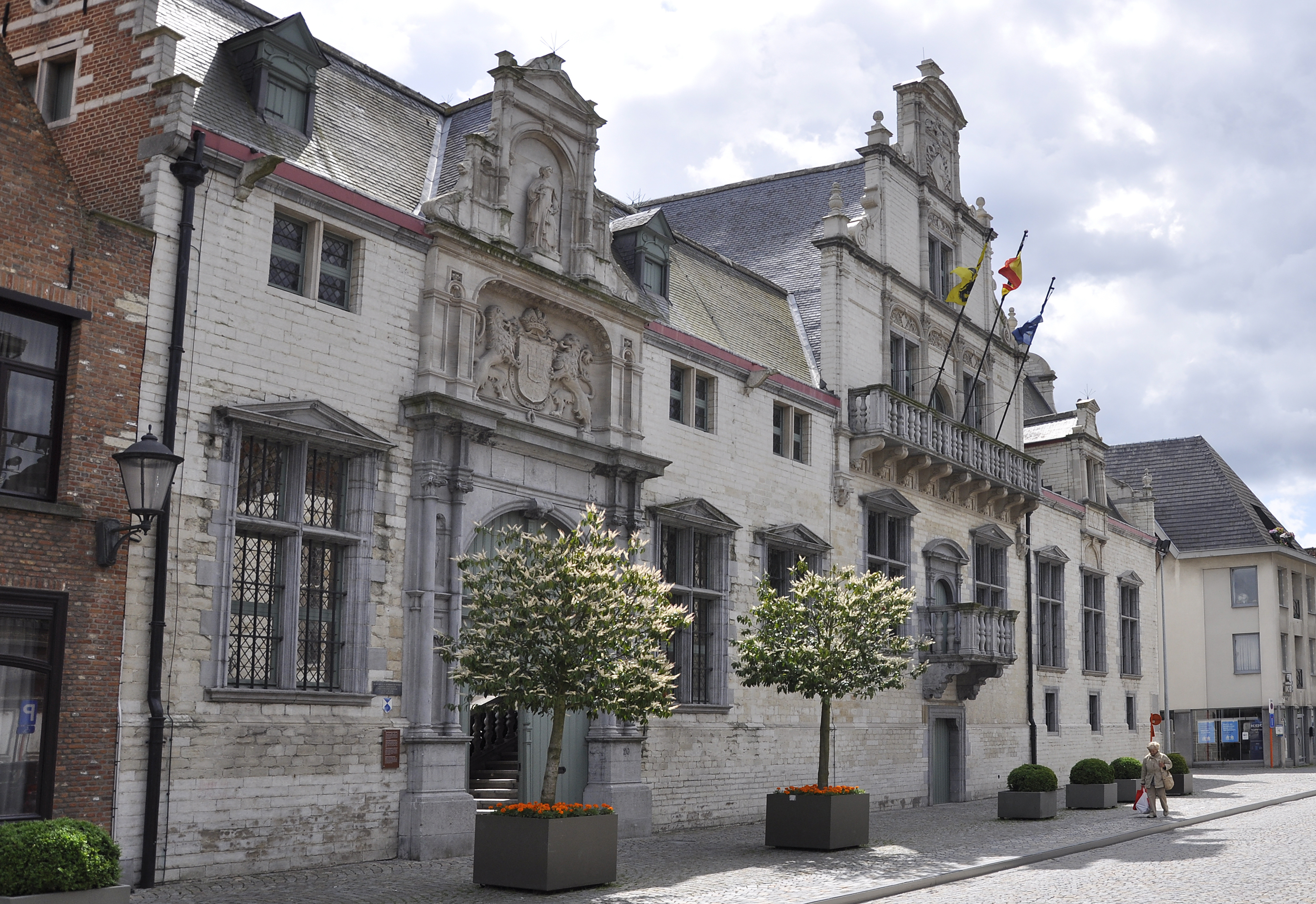 Het Hof van Savoye te Mechelen, België